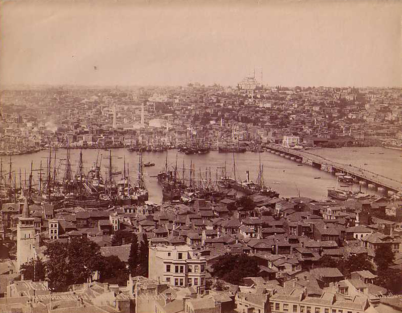 Ünlü 19. yüzyıl fotoğrafçısı Jean Pascal Sebah (1838-1910) tarafından çekilmiş bir Haliç, İstanbul fotoğrafı.